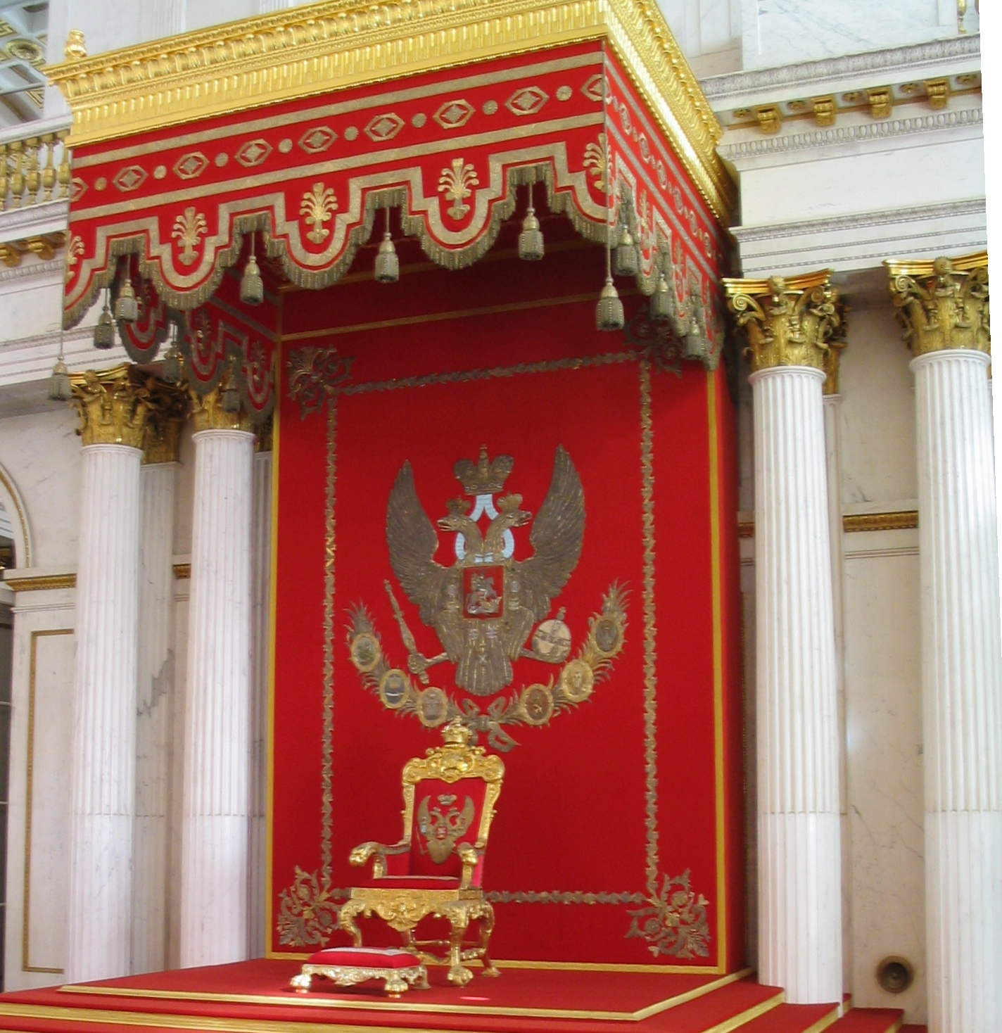 Zarenthron mit Romanow-Familienwappen in der Eremitage.